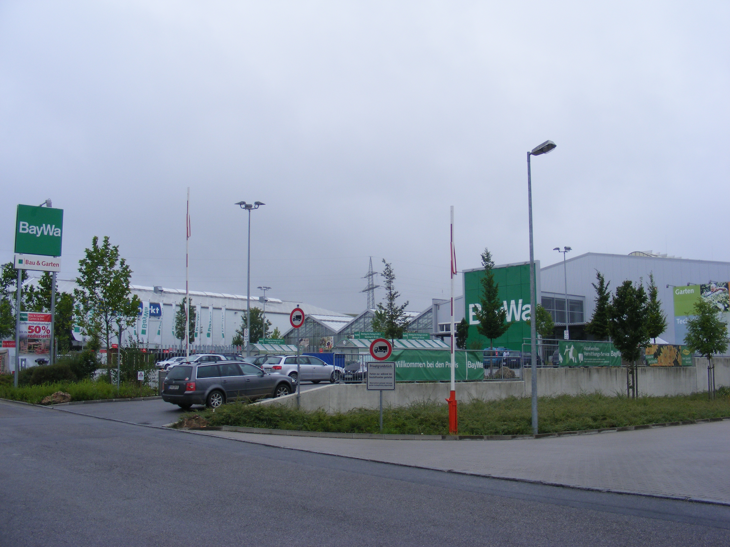 Pfarrkirchen (Niederbayern), Rennbahnstr. 14: BayWa-Baumarkt